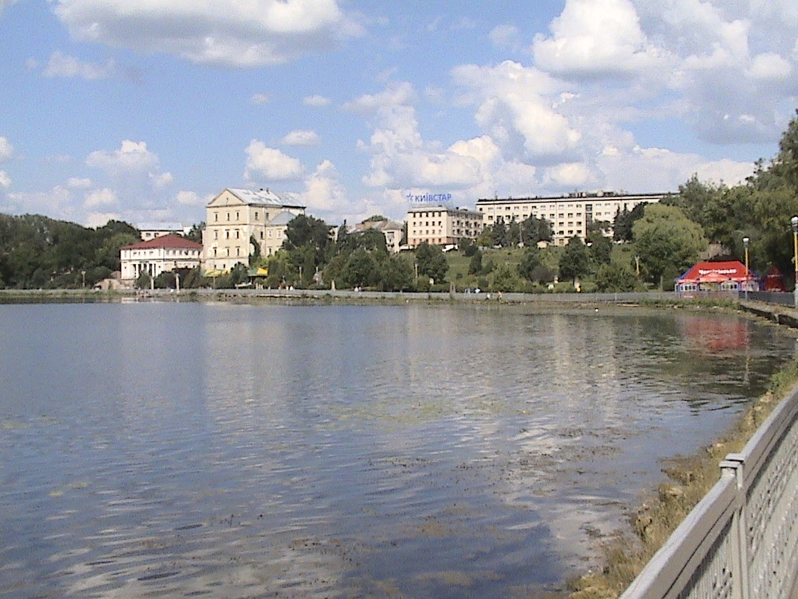 Тернопільський став